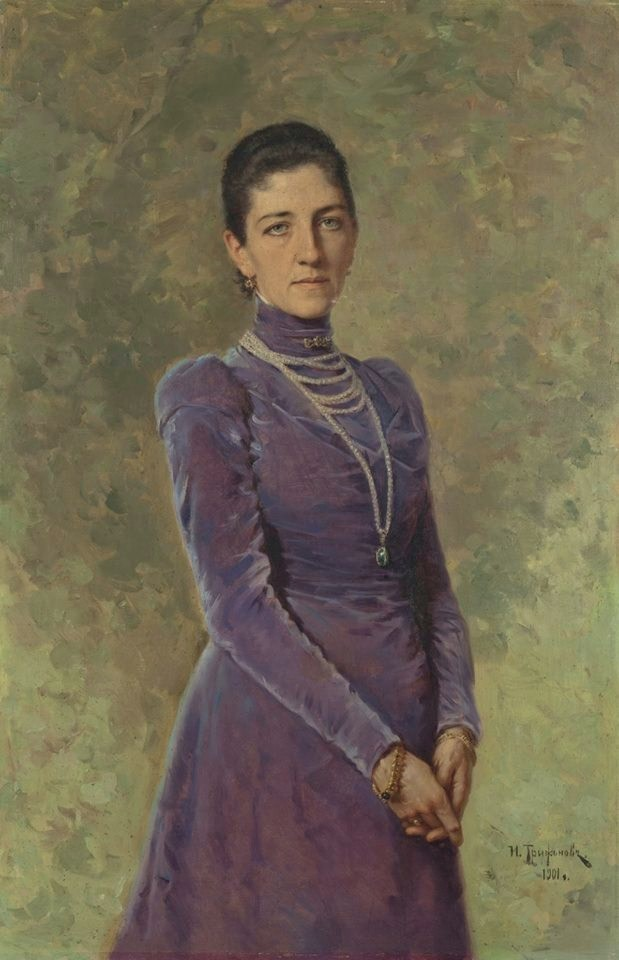 Ольга Николаевна Булыгина, ур. Делянова (1860—1924), в первом браке Хвощинская.